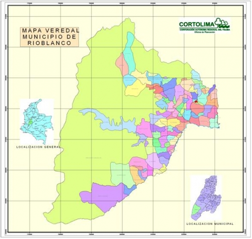 Cortesía Coortolima